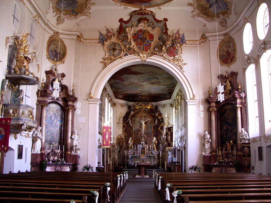 Altshausen, Germany: Schlosskirche